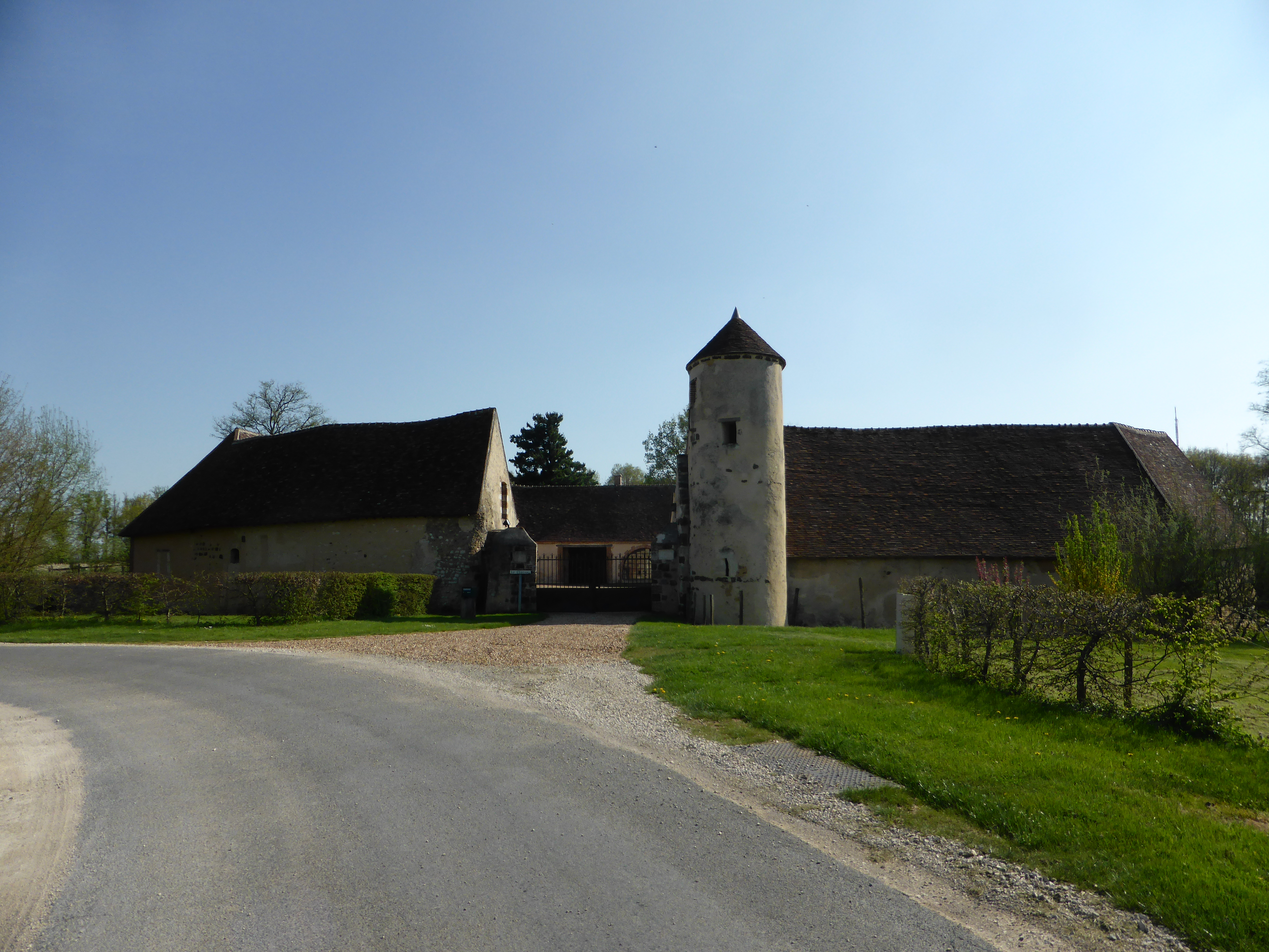 Vieux château de Montireau, en Eure-et-Loir. Cette ferme fortifiée contient des éléments du château médiéval, détruit en grande partie au XVIIIe siècle.